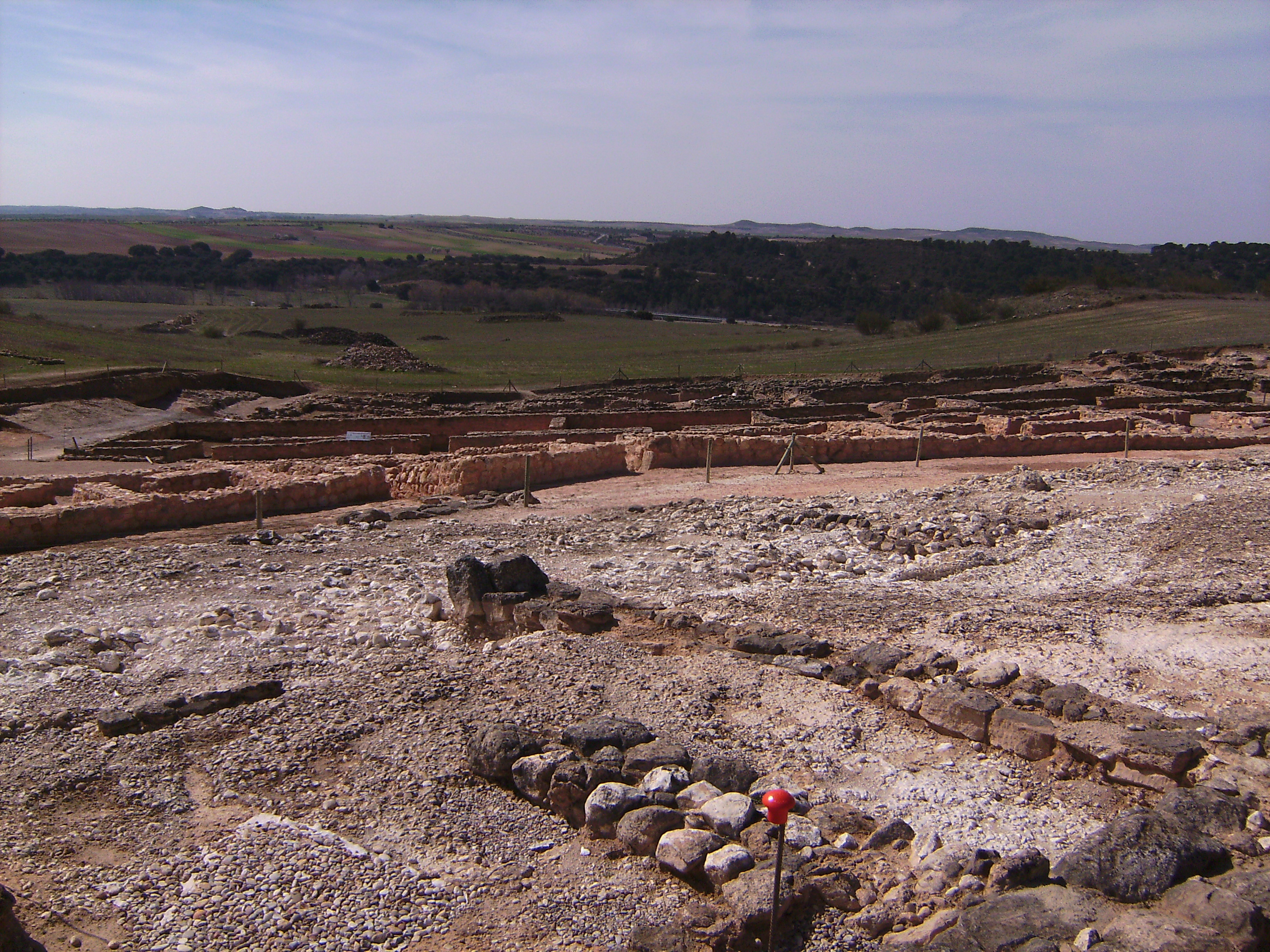 Recopolis - Vista del Yacimiento